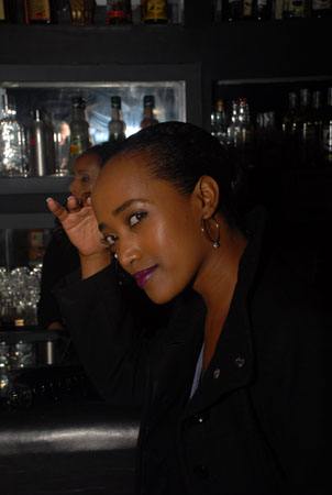 אסתי ממו